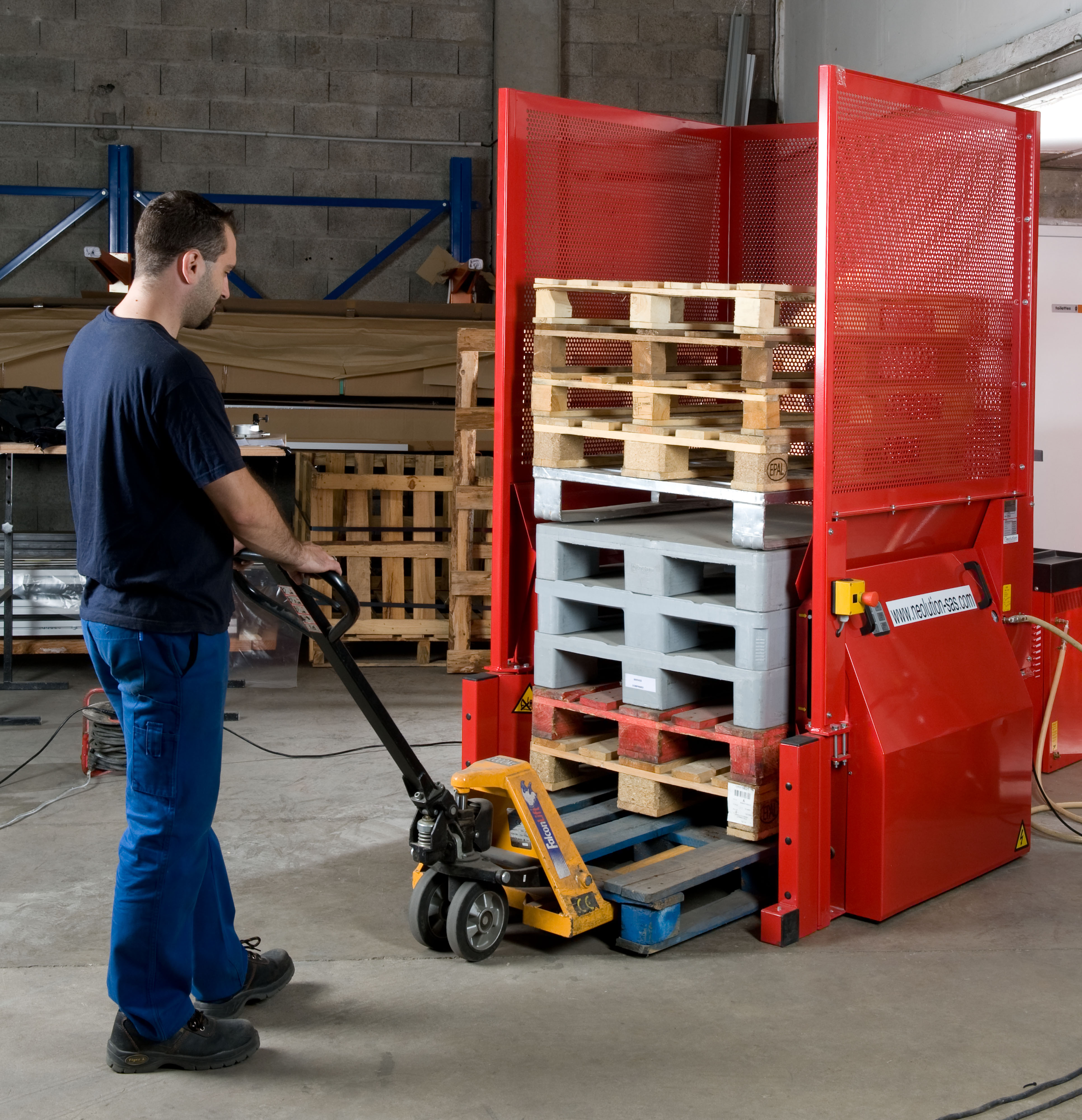 Un opérateur utilisant un dépileur empileur de palette